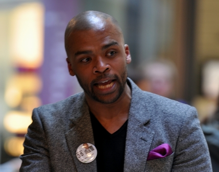 Jani Toivola 9. huhtikuuta 2011.